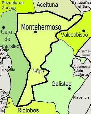 Límites del término municipal de Montehermoso